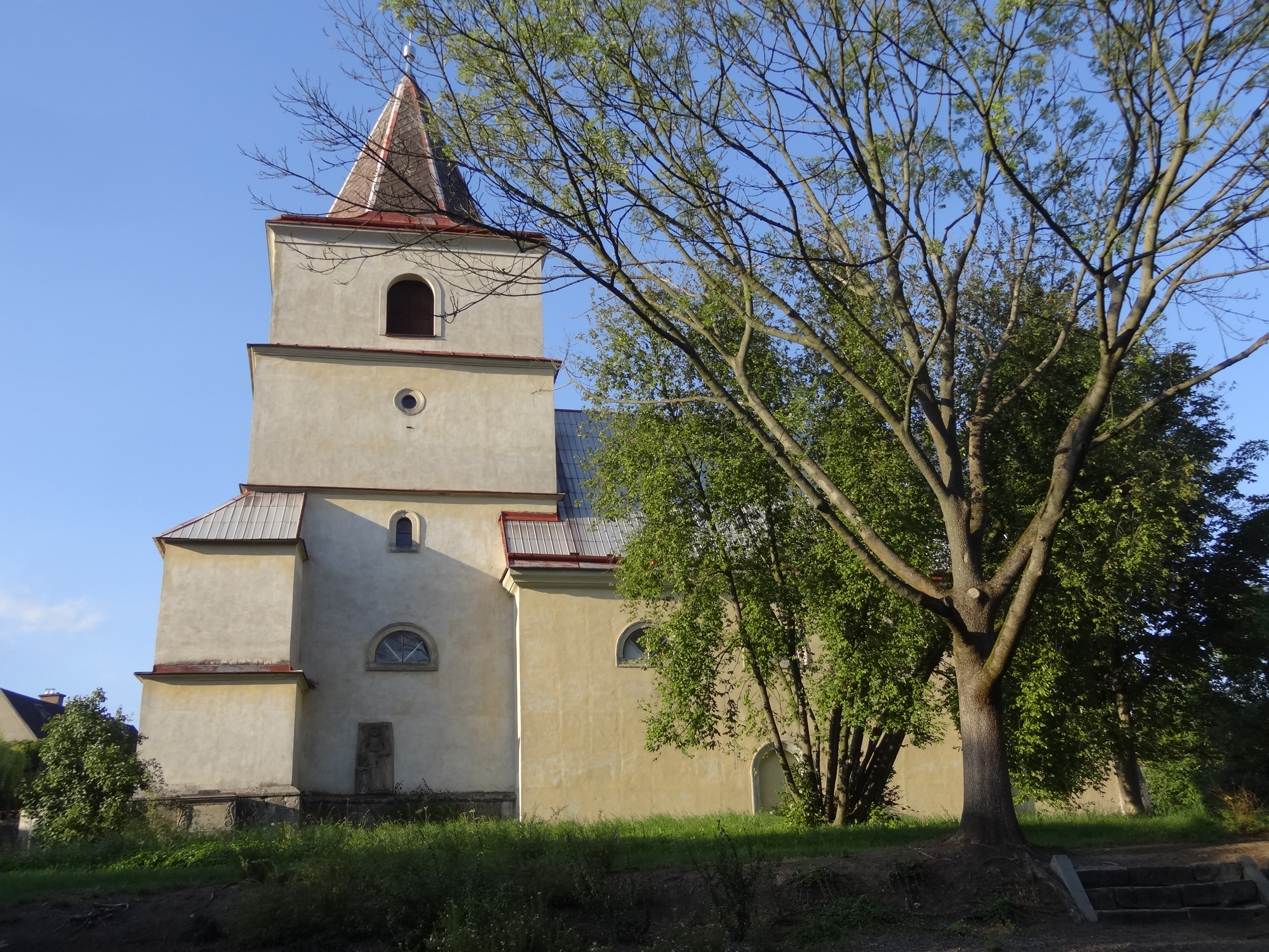 Kostel svatého Jakuba, Bílá Třemešná.